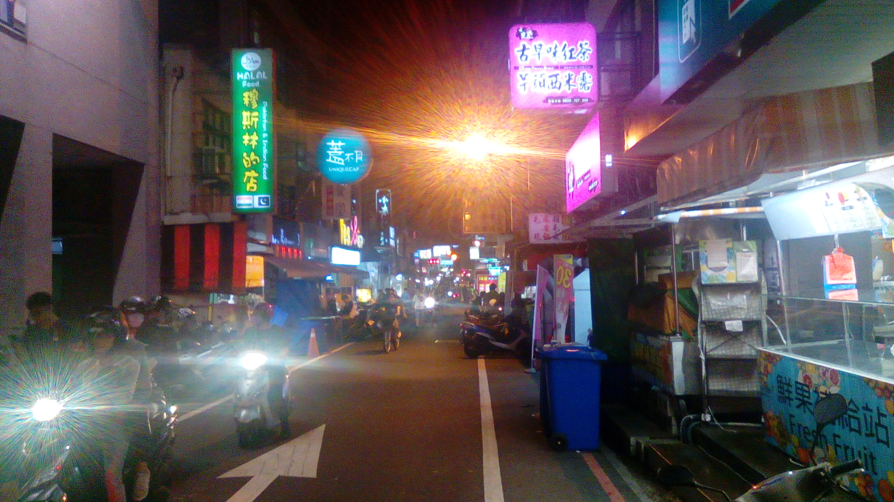 台南市東區育樂街 攝於晚間十點